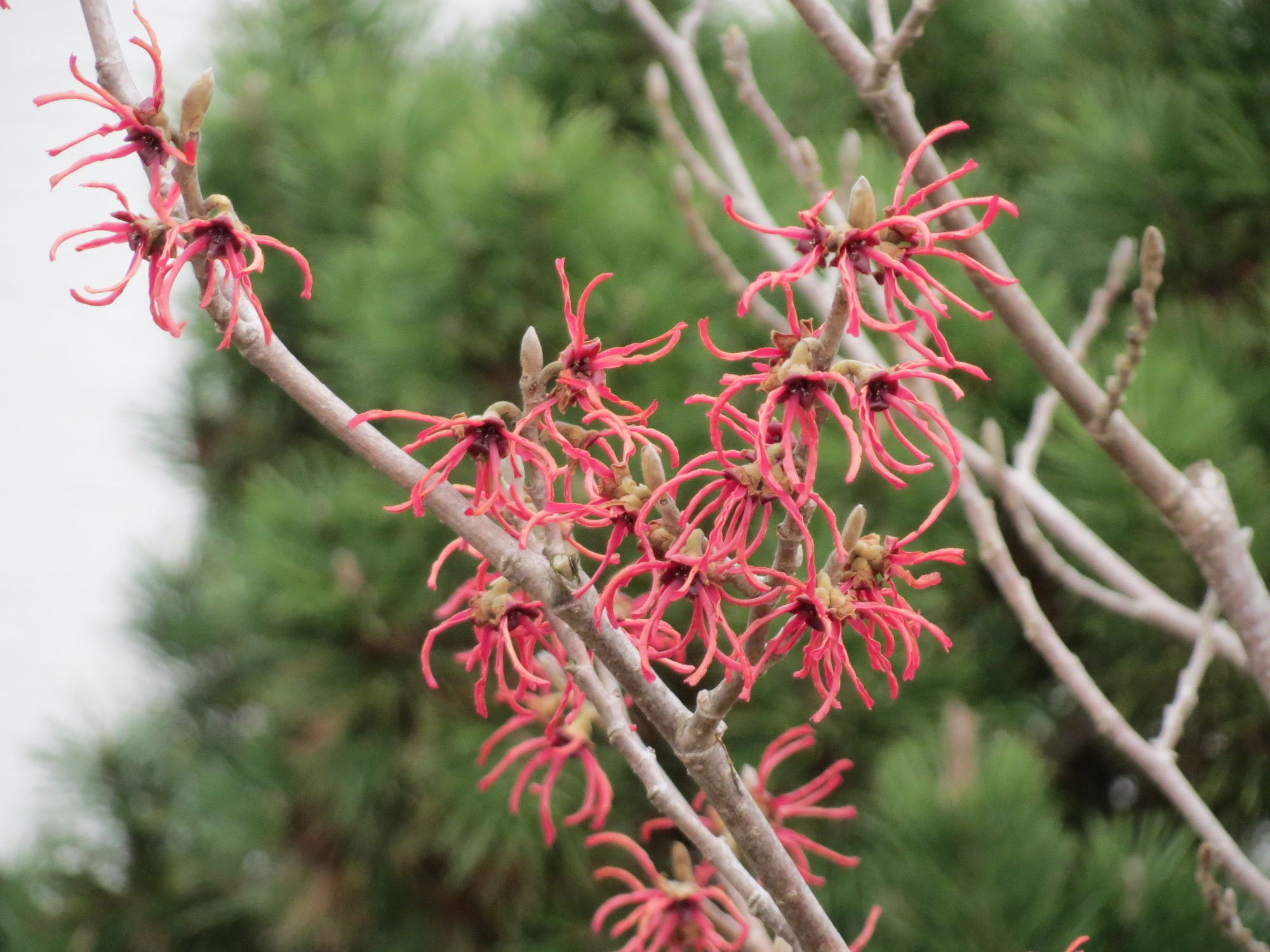 Hybrid-Zaubernuss (Hamamelis x intermedia) in Hockenheim